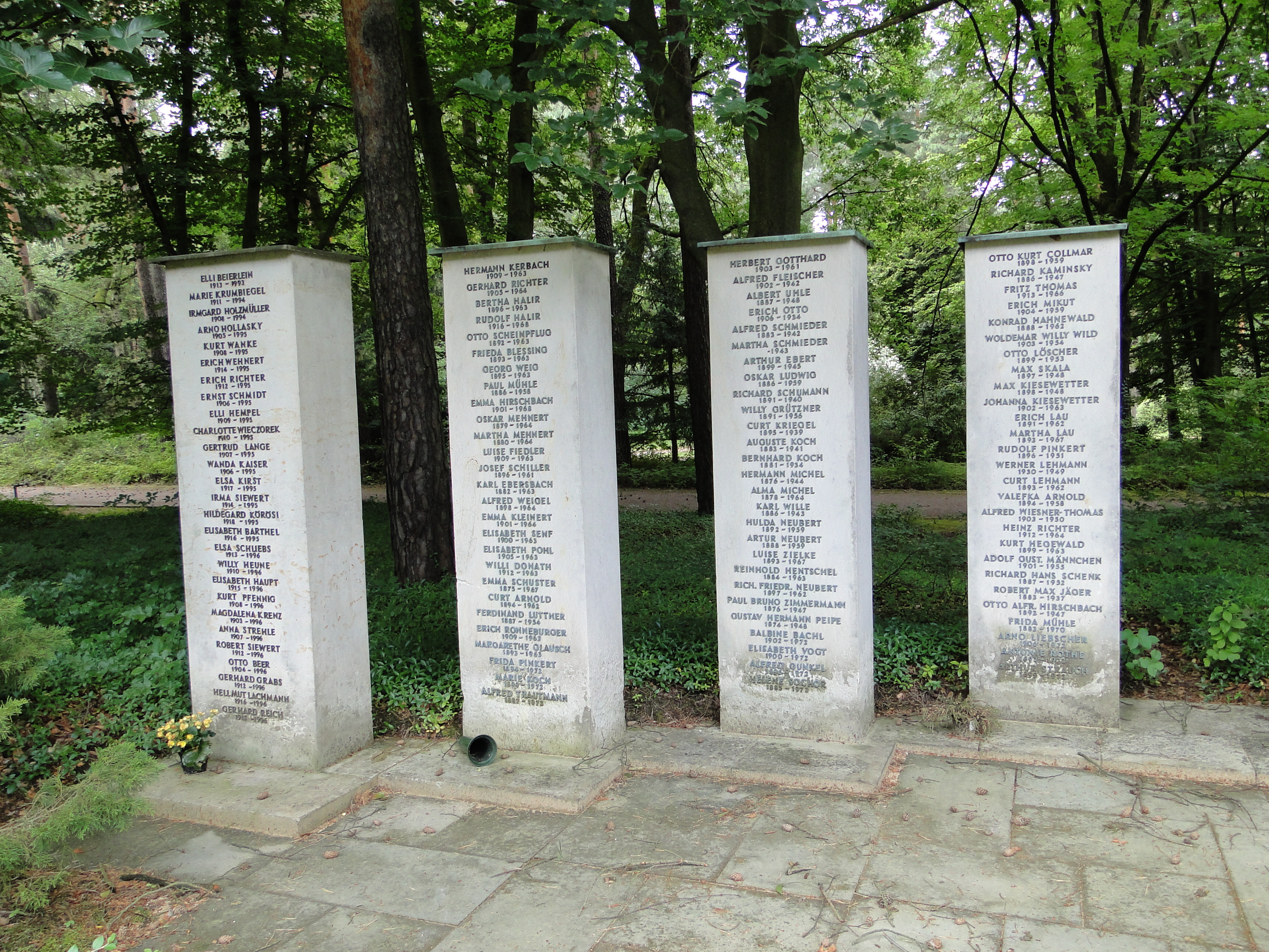 Urnengräber im Ehrenhain des Heidefriedhofs Dresden (u.a. Alfred Schmieder)